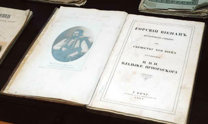 Srpski (latinica): Bečko izdanje Gorskog vijenca 1847.